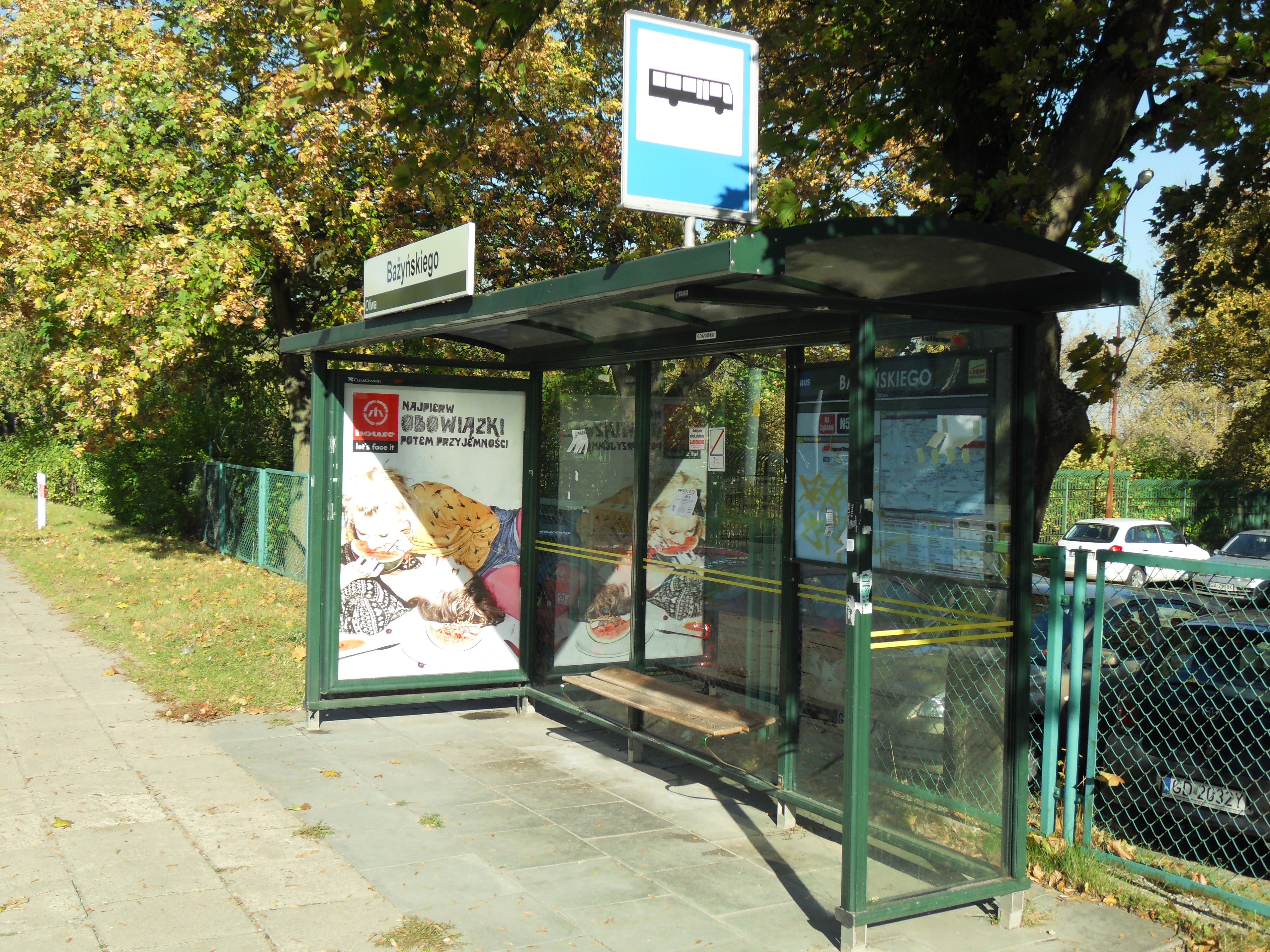 Gdańsk Oliwa, przystanek autobusowy przy ul. Wita Stwosza.